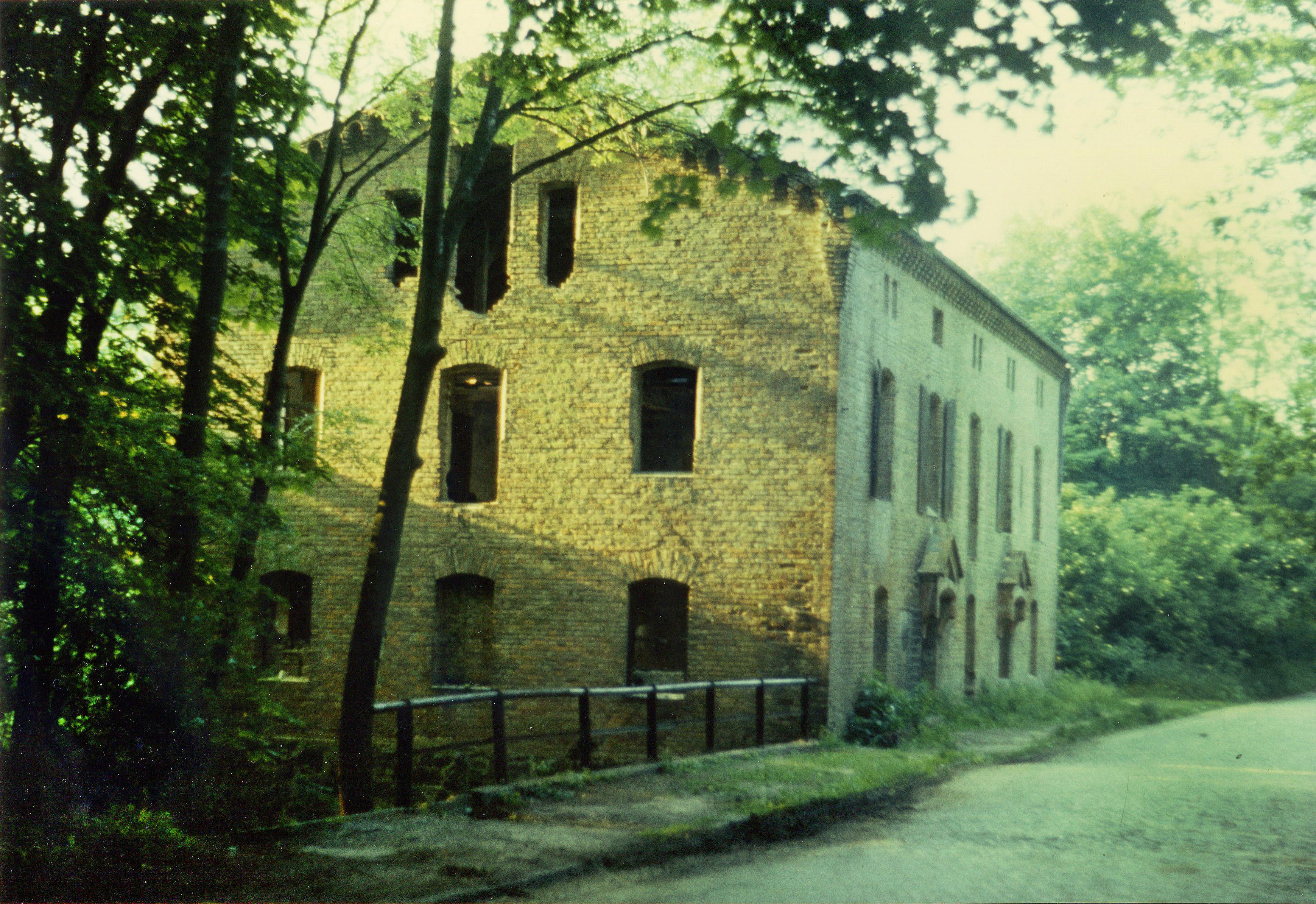 Historisches Kleinmachnow: Bäkemühle als Ruine, um 1985. Ab 1986 wurde die Bäkemühle gesichert und wieder aufgebaut.